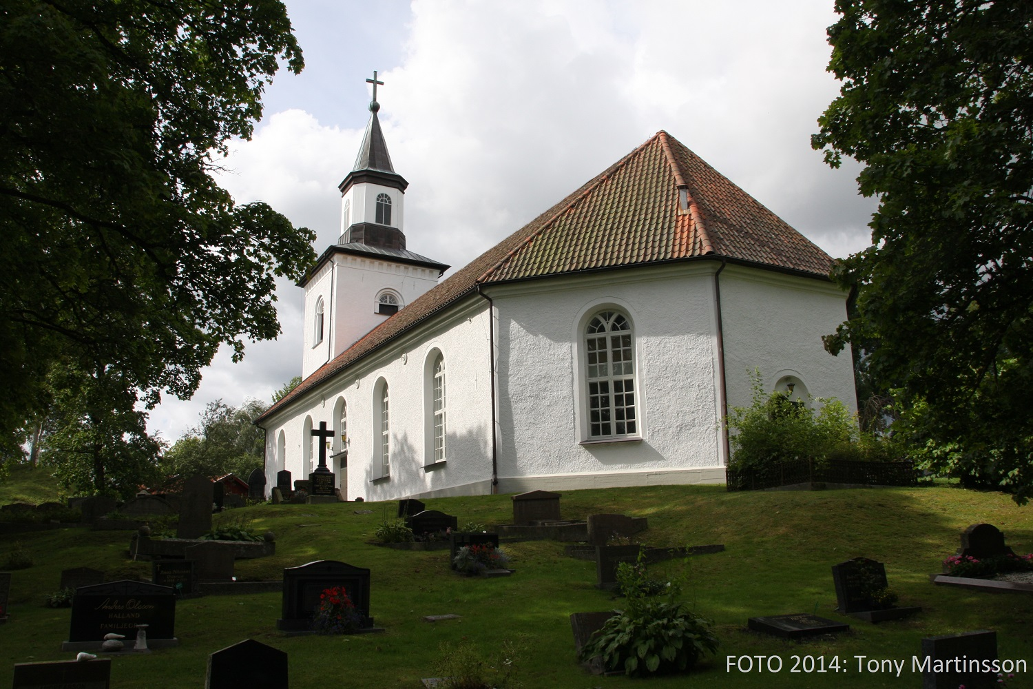 Krokstads Kyrka med del av kyrkogården.